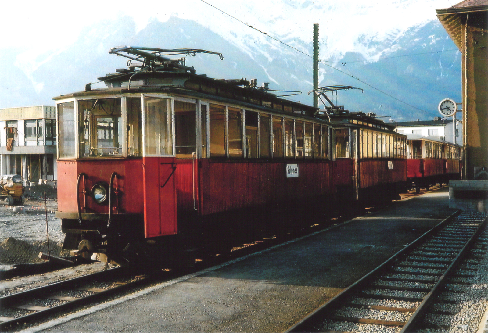 4-achsiger „Stubaier-Triebwagen“